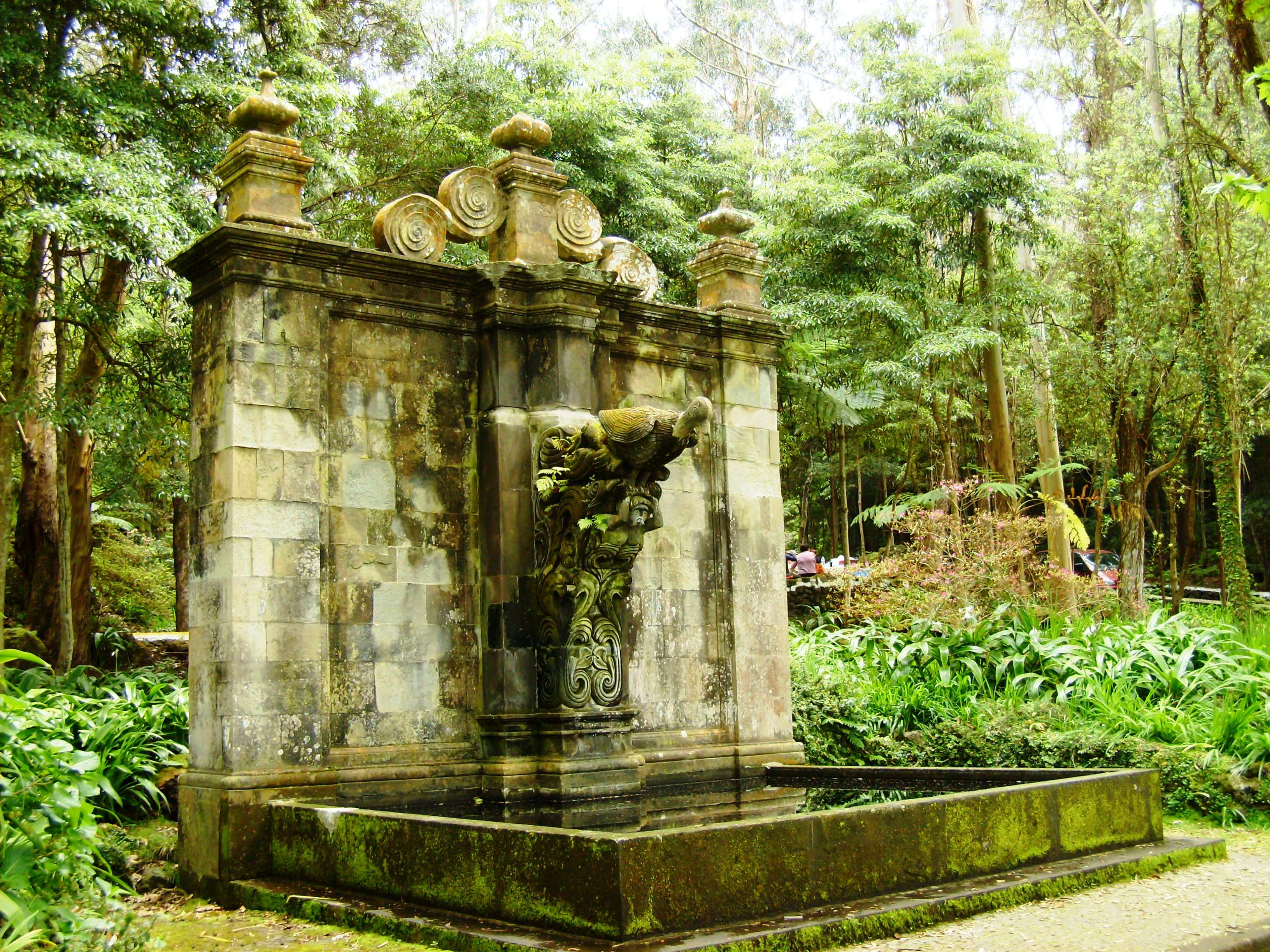 Reserva Florestal de Recreio da Mata da Serreta, Serreta, Angra do Heroísmo, ilha Terceira, Açores: chafariz do claustro do antigo Convento da Graça, no Alto das Covas, em Angra do Heroísmo.